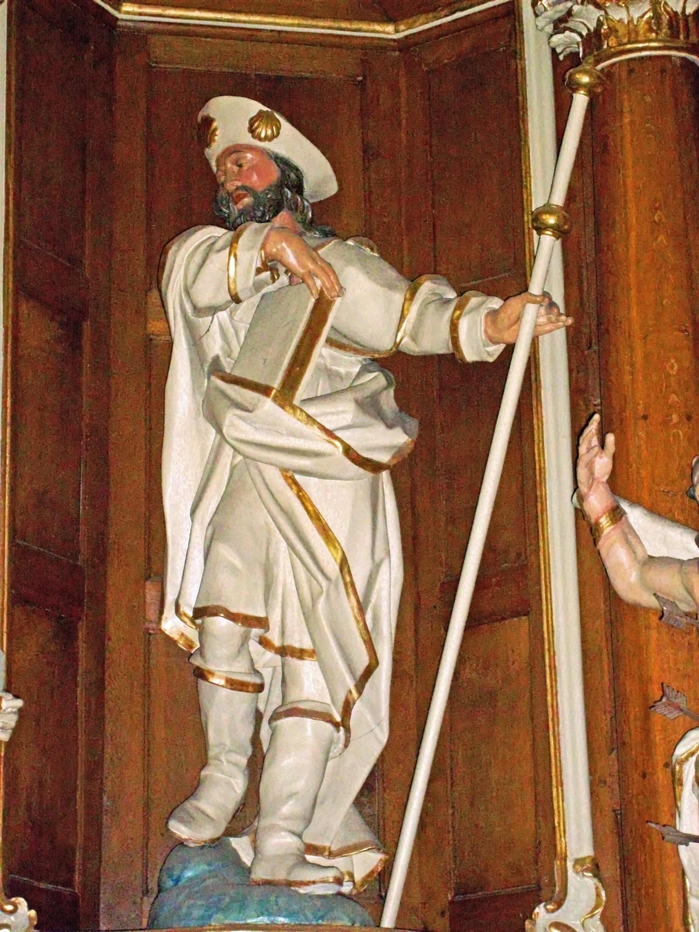 Villmar - St. Peter - Jakobus d.Ä.